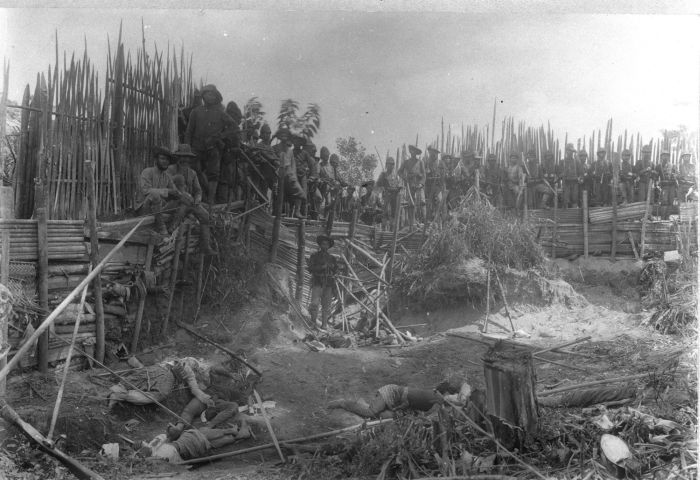 foto. Op de bres bovenaan, derde van links, staat Van Daalen, naast de militair in het midden een nog in leven zijnd kind.. Groepsportret van de marechaussee, met overste Van Daalen, bij de vermoorde inwoners van de versterkte kampong Koeto Reh, nadat deze is ingenomen tijdens de tocht naar de Gajo- en Alaslanden onder leiding van Van Daalen